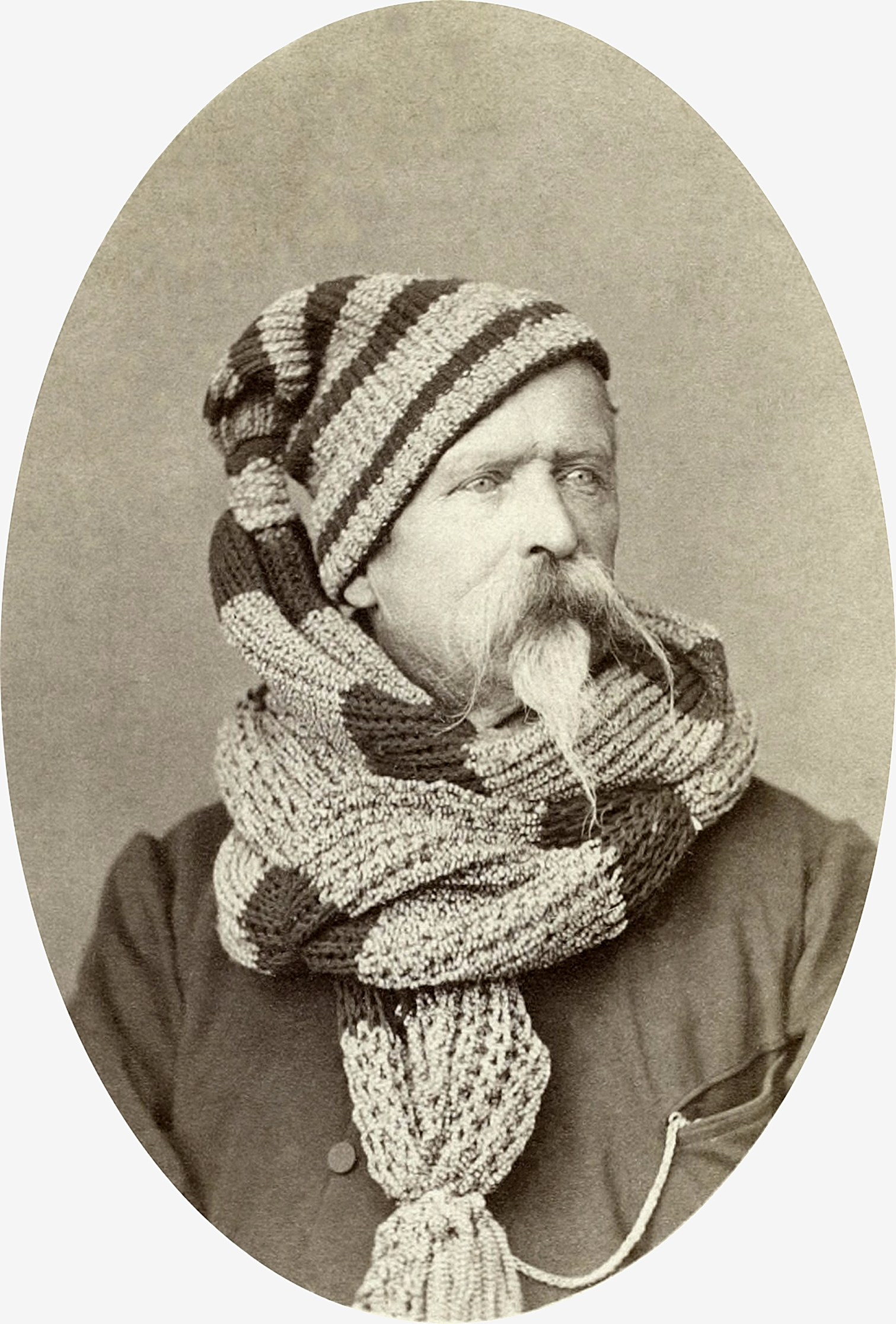 Charles-Marie-Étienne Champion Dubois de Nansouty, (1815 - 1895), général et pyrénéiste français.